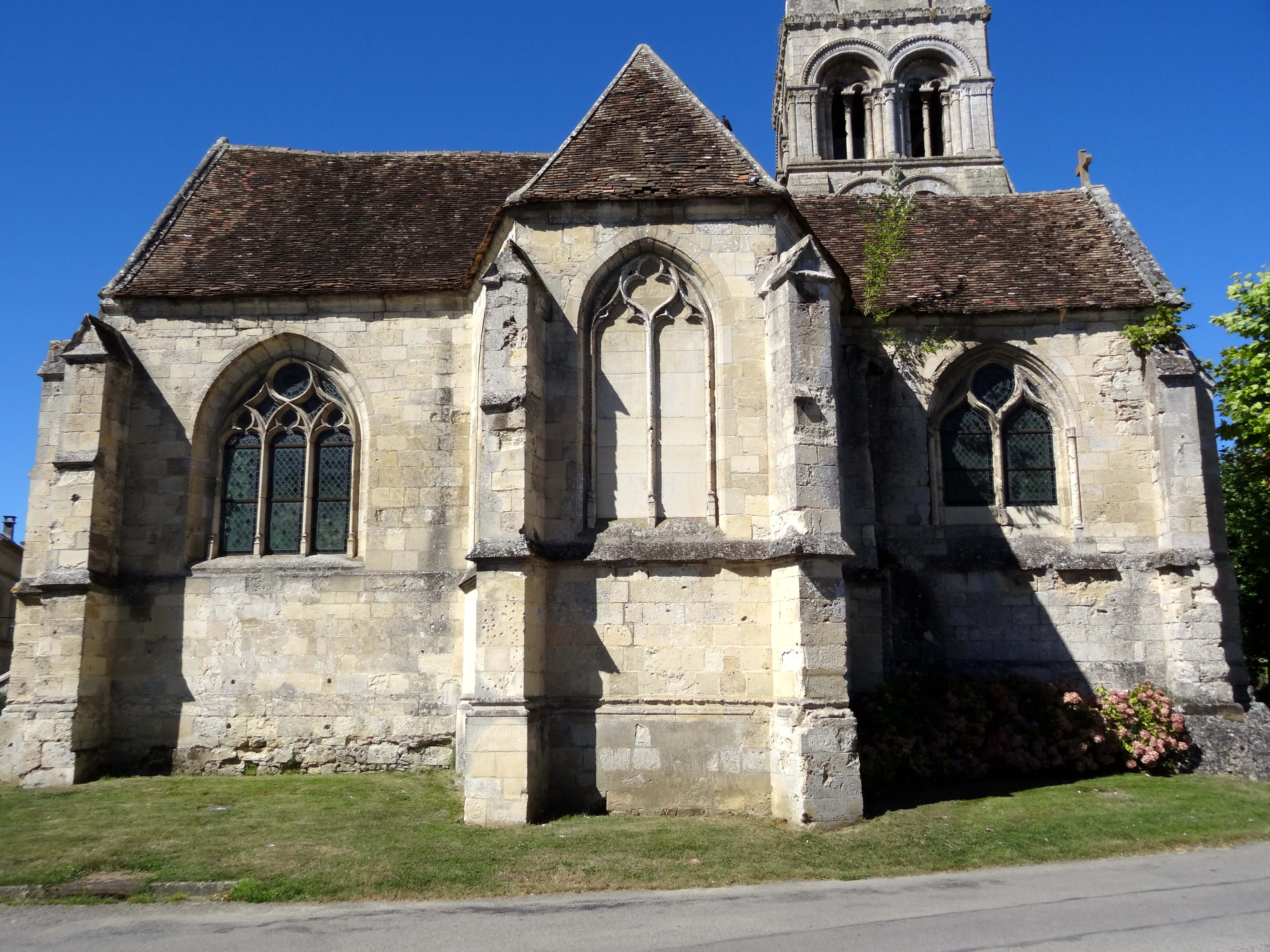 Église Sainte-Geneviève de Marolles - voir titre.